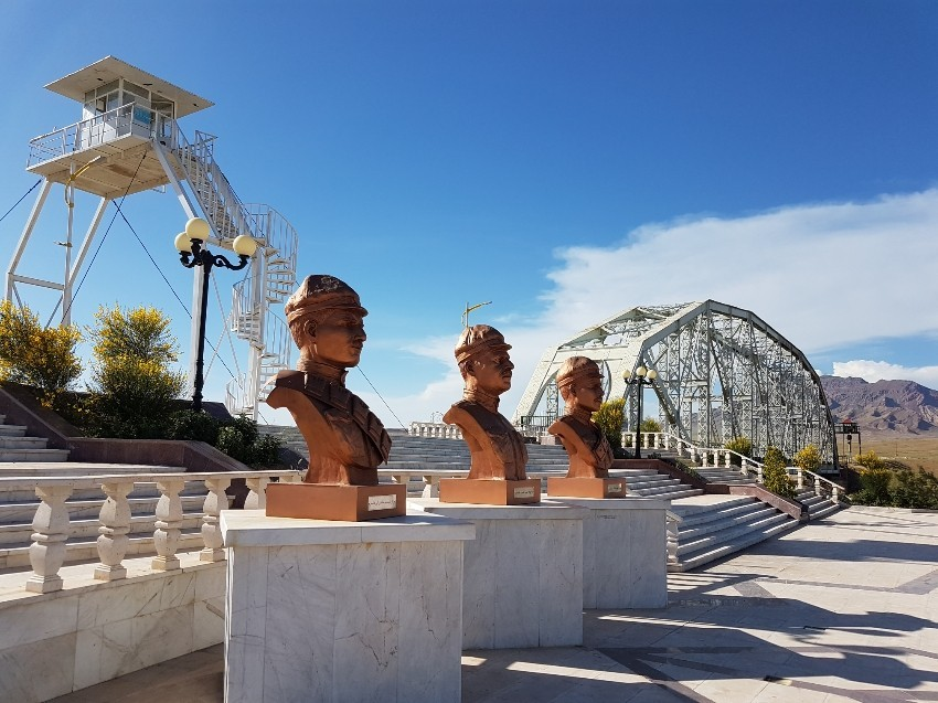 یادمان سه شهید شهریور 1320 در مرز جلفا